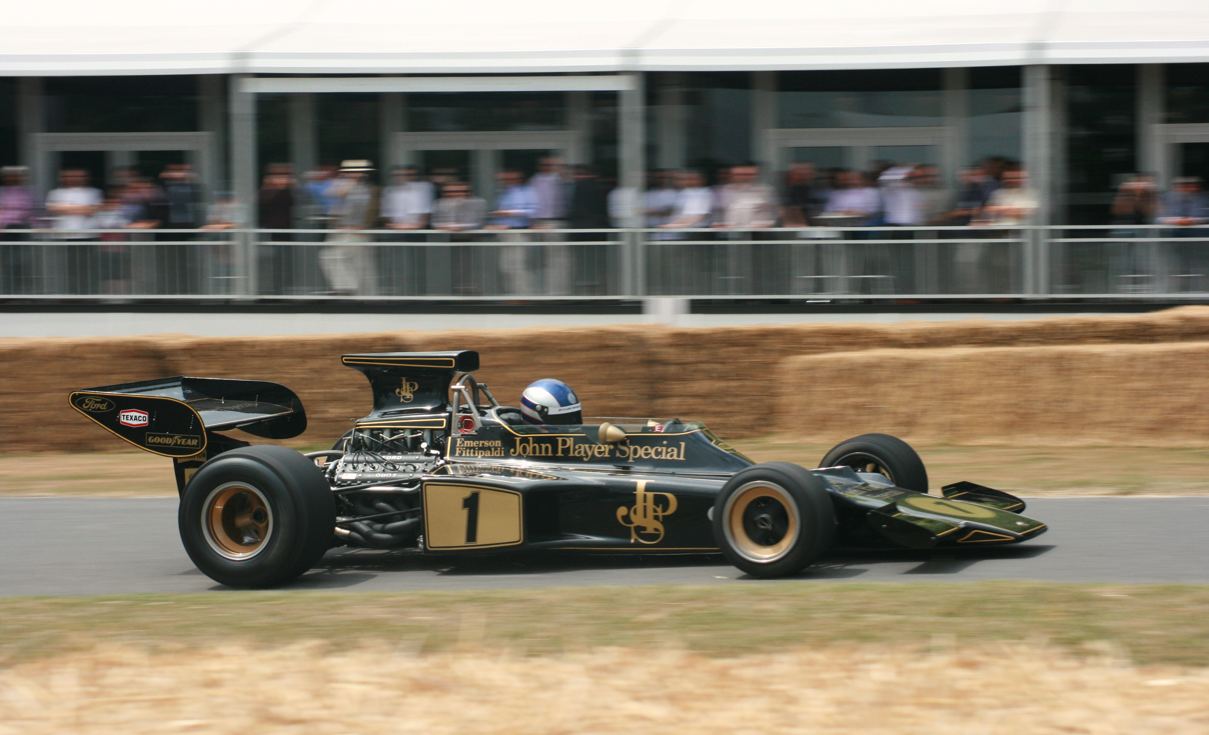 Stunning - just stunning.